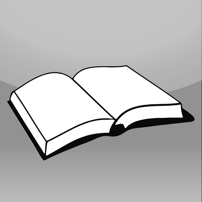 Icono Normativa